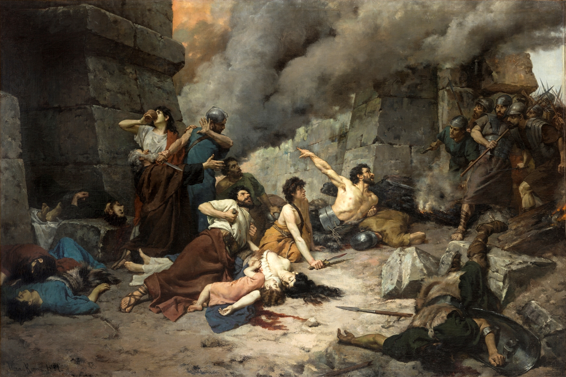 La obra representa el momento en que los últimos defensores de la ciudad hispana de Numancia se dieron muerte a sí mismos a fin de impedir que fueran capturados vivos por los romanos, que en esta obra aparecen entrando en la ciudad mientras los numantinos se suicidan.